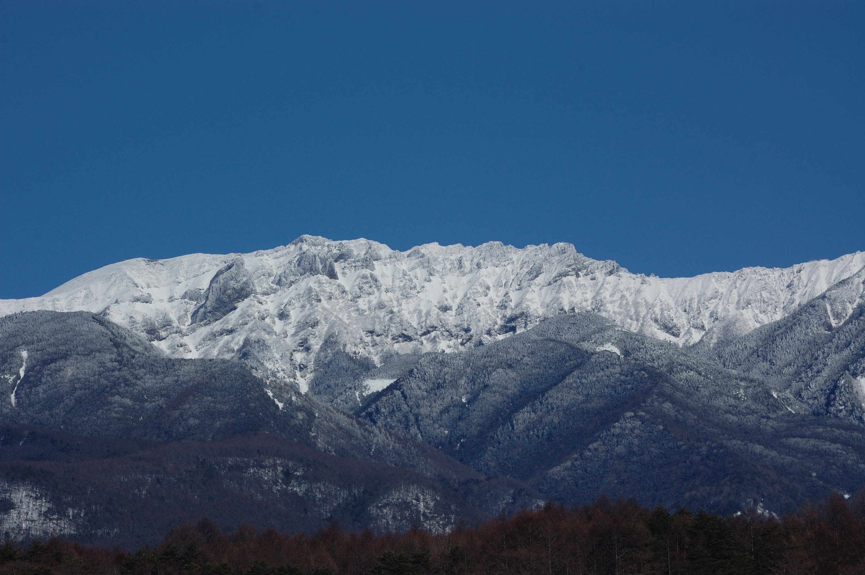 八ヶ岳 横岳